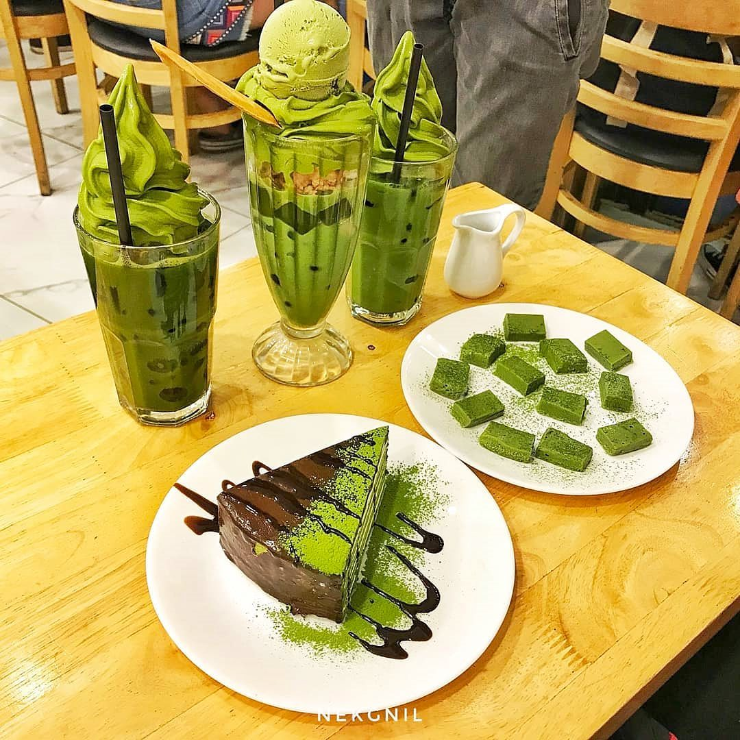 Các loại thức uống matcha, bánh ngọt, món ăn Nhật Bản